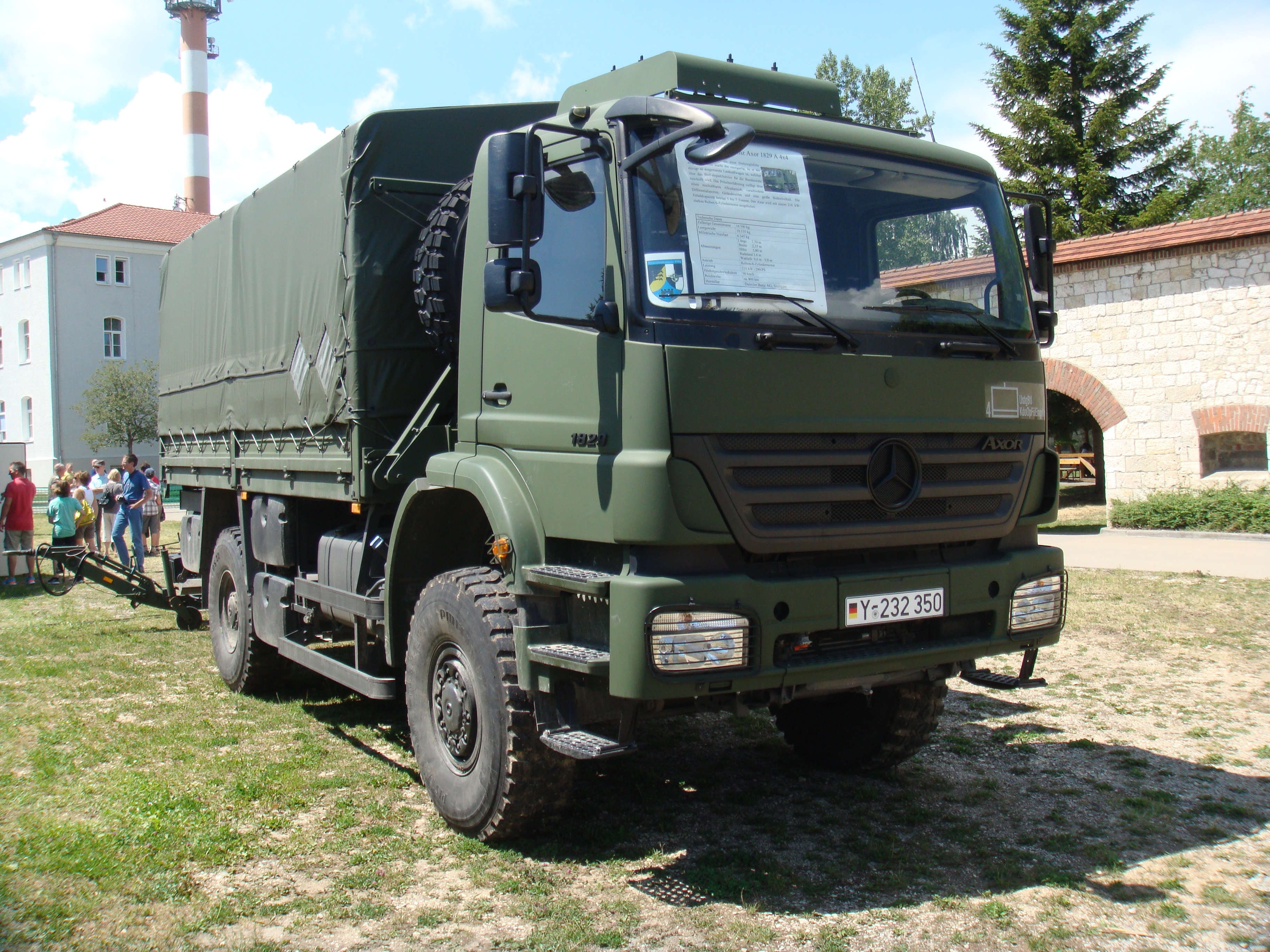 MB Axor 1829 A (hüms)